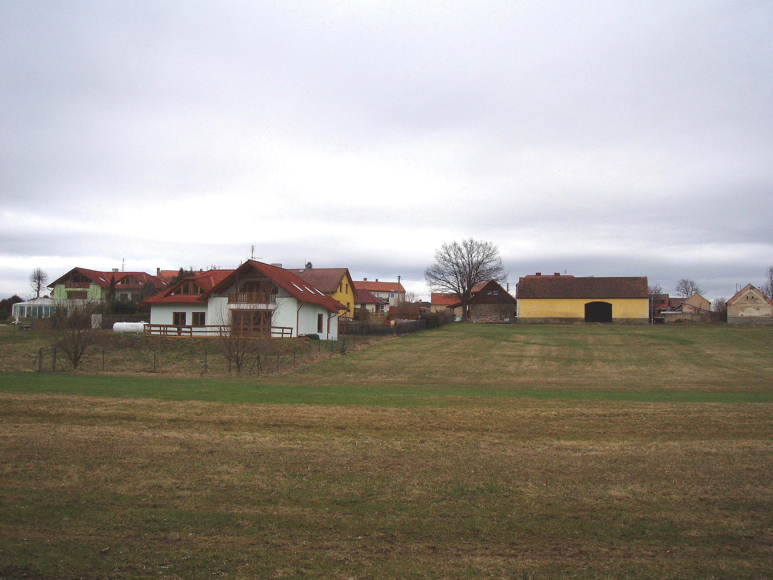 Středočeská víska Budín